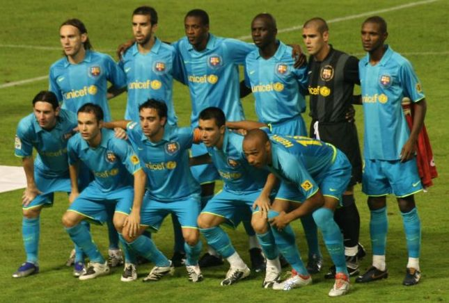 Cropped version of Image:FC Barcelona 2007.jpg. Formació inicial FC Barcelona 29/9/2007, contra el Llevant. - Formazione iniziale del FC Barcelona contro il Lecante UD, 29/9/2007